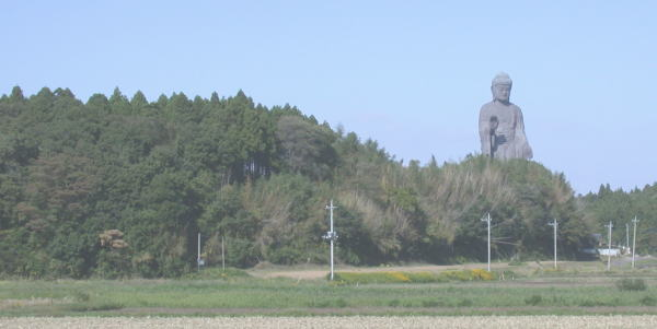 久野城跡の遠景